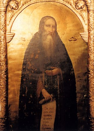 Anthony Pechersky Преподобный Антоний Печерский Категория:Изображения:Иконопись